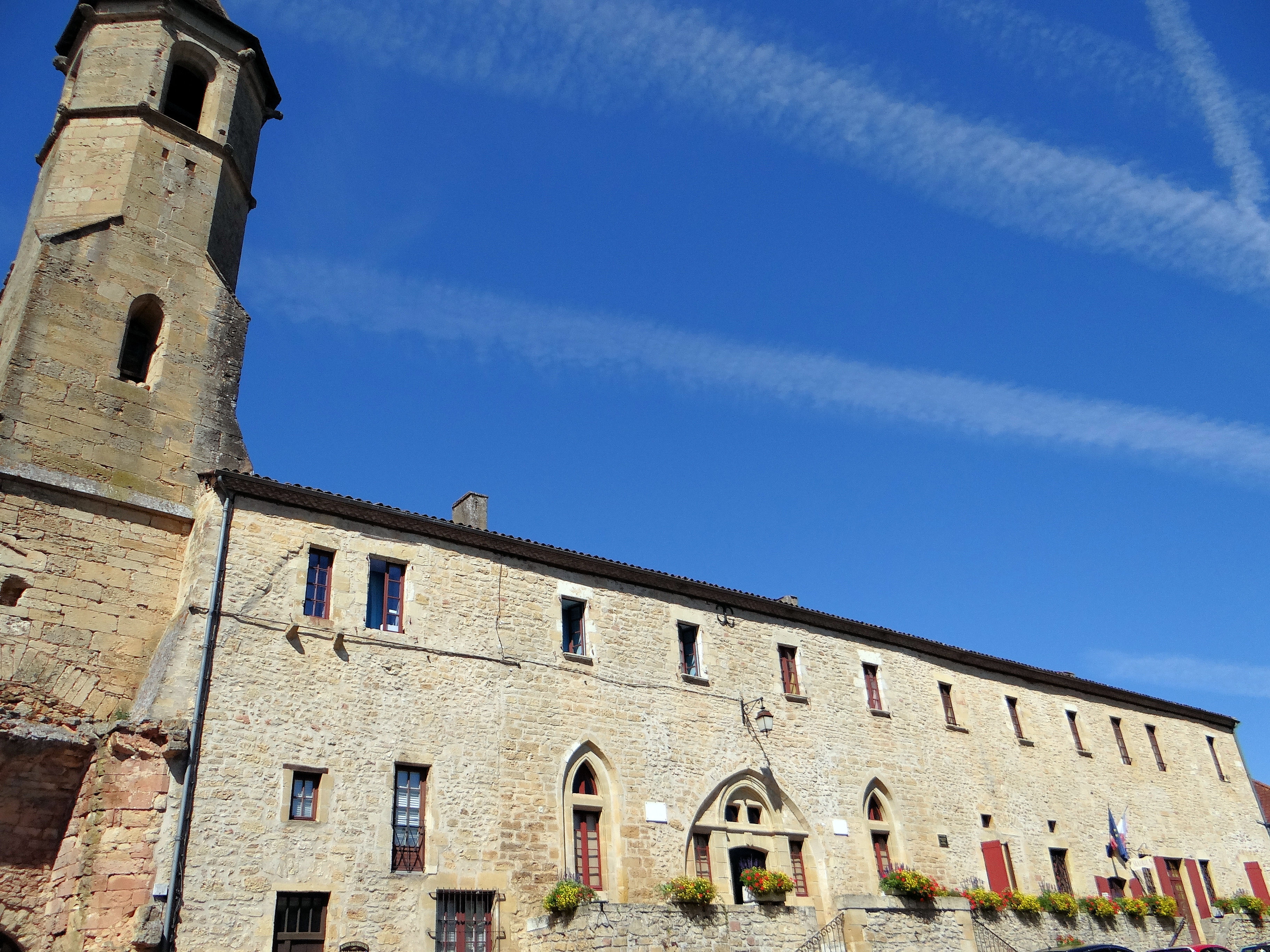 Belvès - La mairie et le clocher de l'ancien couvent des cordeliers